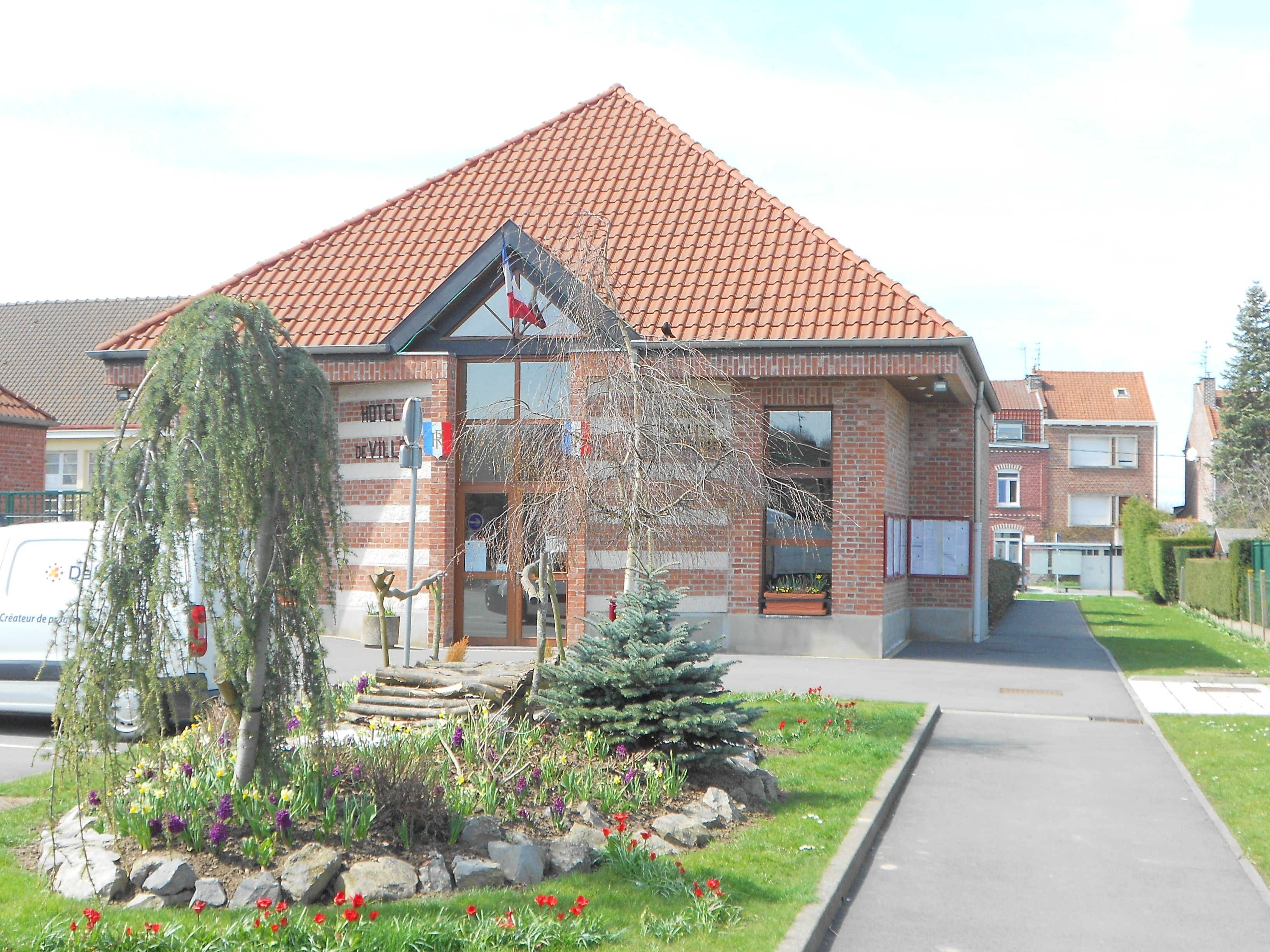 Mairie de Tressin (Nord, 59)